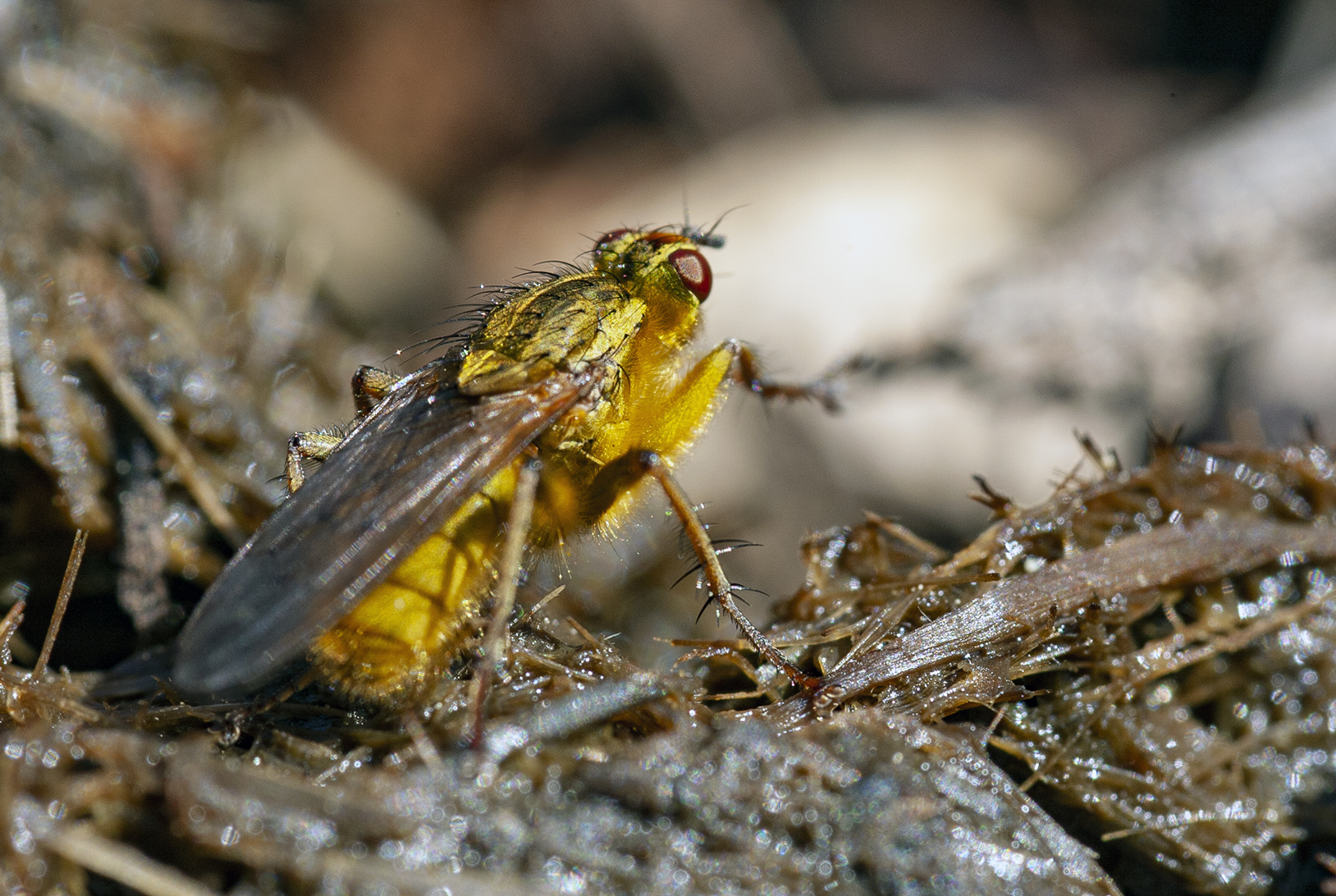 Dans les champs